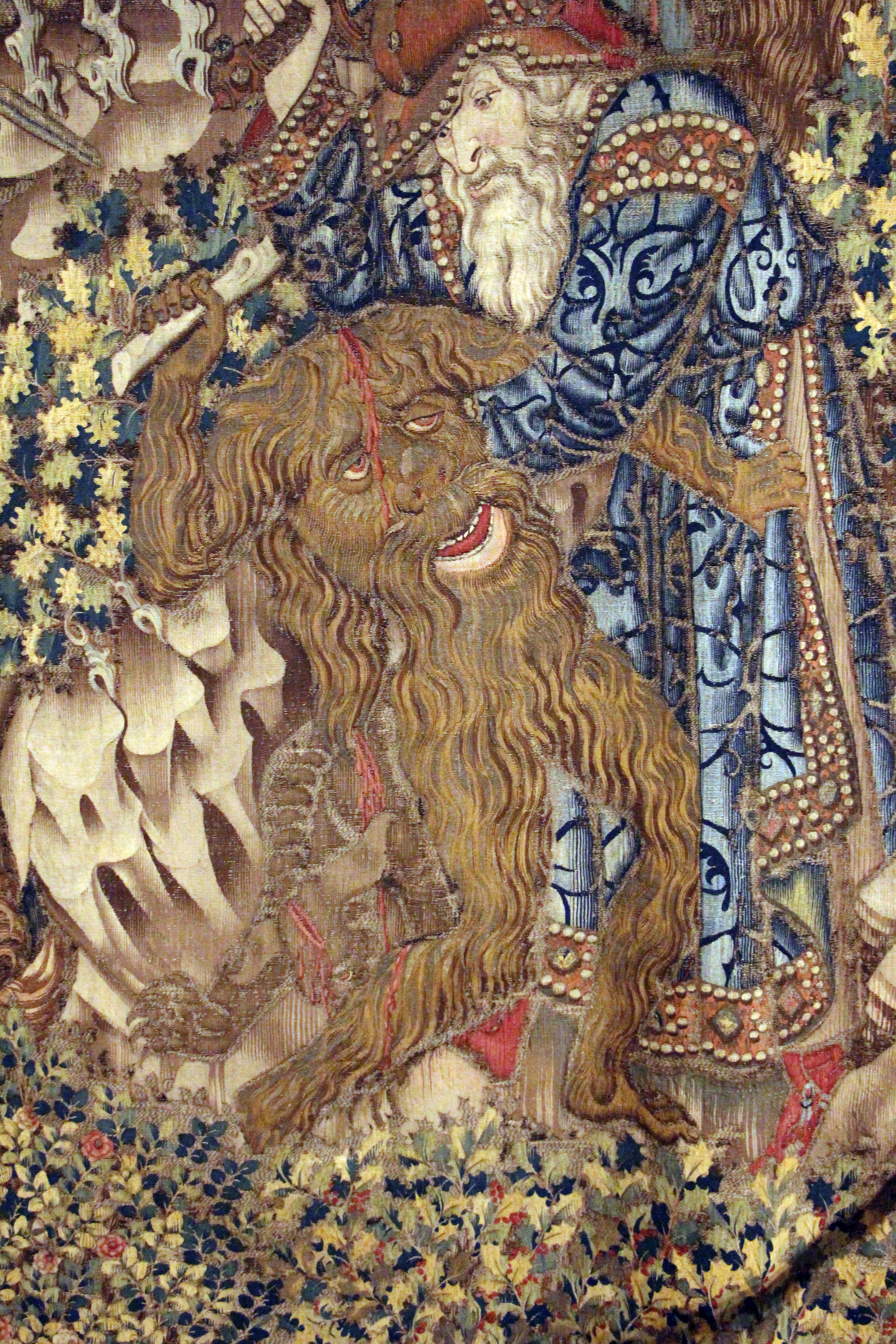 Tournai, arazzo con maturità di alessandro magno, 1460 ca, probab. fatti fare da pasquier grenet per filippo il buono, 43.JPG